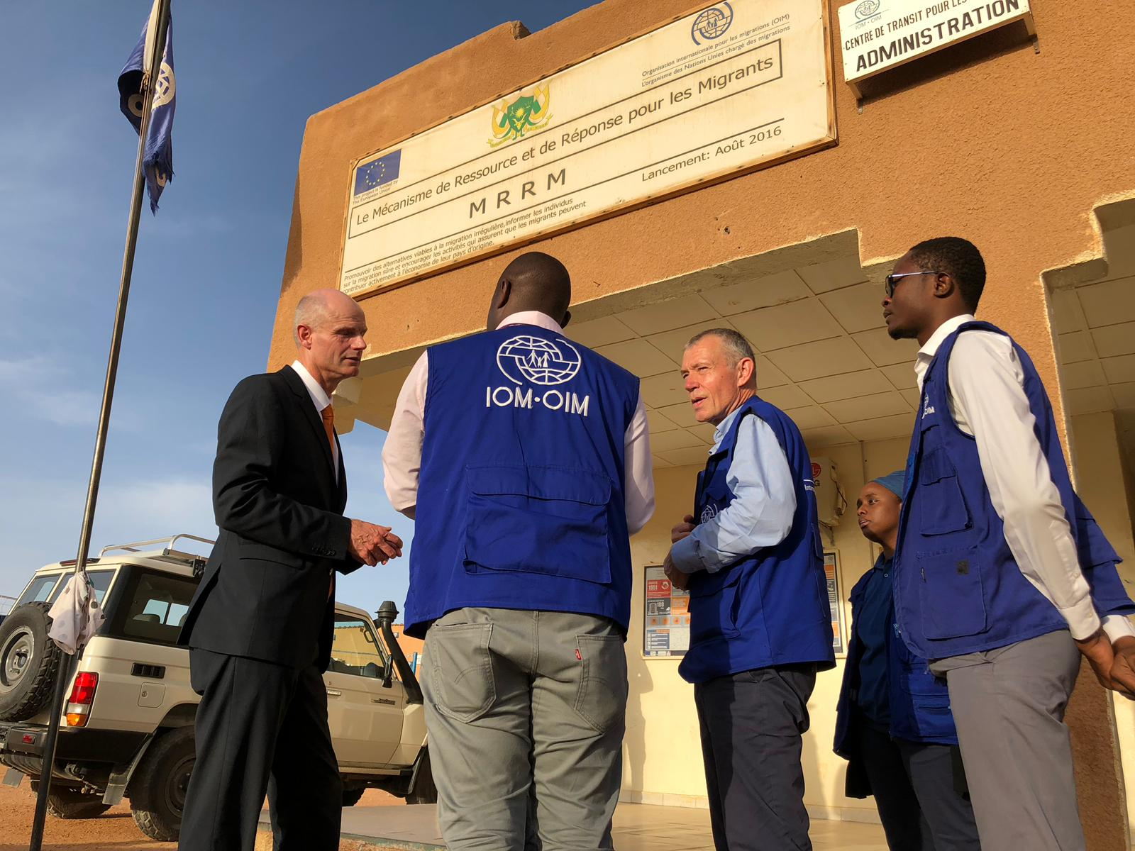 Minister Blok bracht van 30 oktober tot en met 1 november een bezoek aan achtereenvolgens Nigeria, Niger en Tunesië. Deze landen zijn op veel gebieden belangrijke partners voor Nederland. Minister Blok in gesprek met IOM in Agadez, Niger.